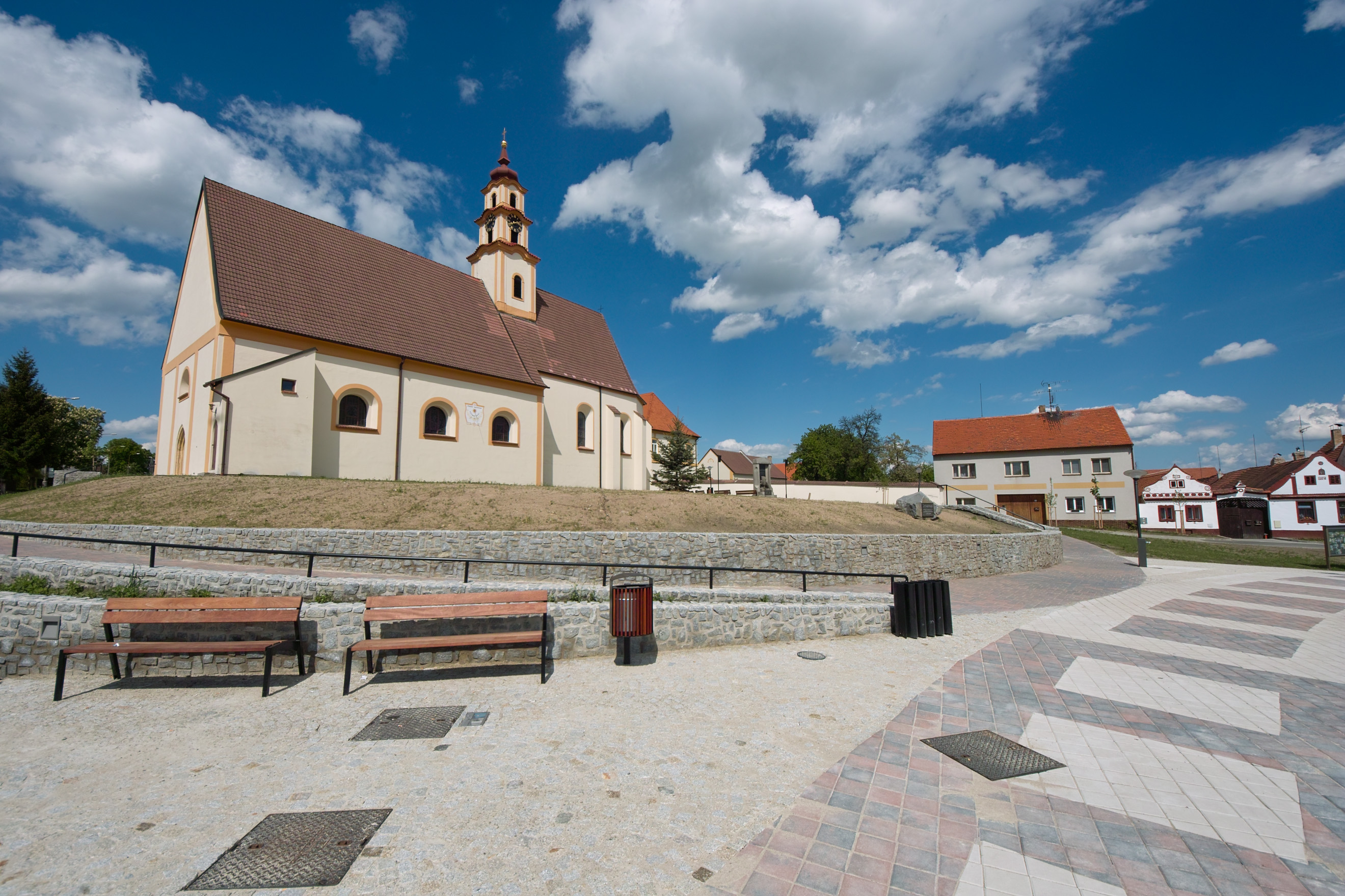 Nové náměstí v Ševětíně vzniklé spojením Malého náměstí a náměstí Šimona Lomnického. Kostel svatého Mikuláše.